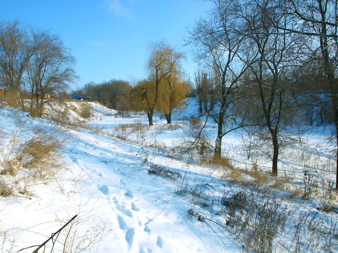 Циганський яр узимку, Луганськ